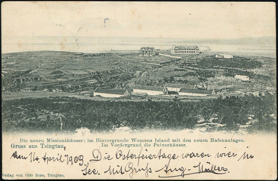 青岛教会山